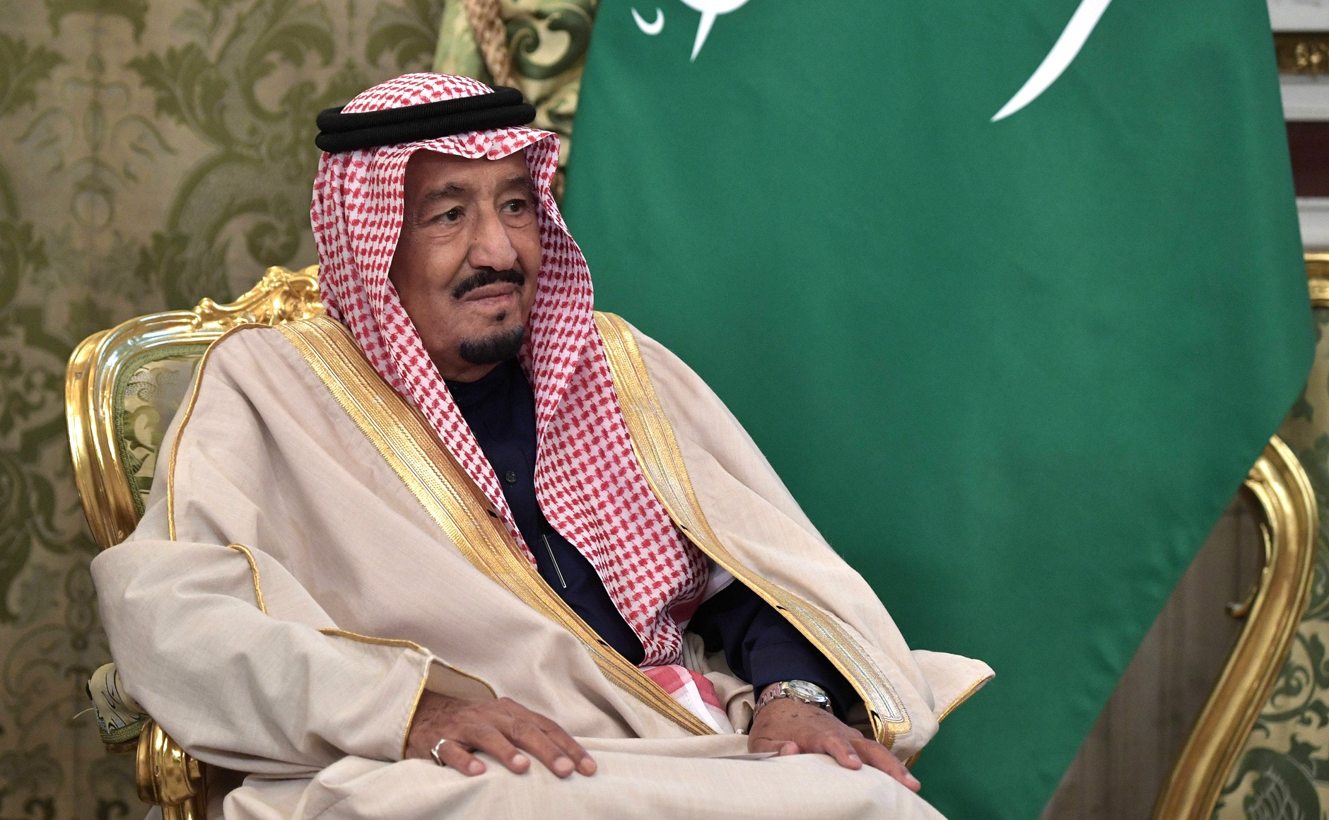 Король Саудовской Аравии Сальман Бен Абдель Азиз Аль Сауд во время встречи с Президентом России Владимиром Путиным